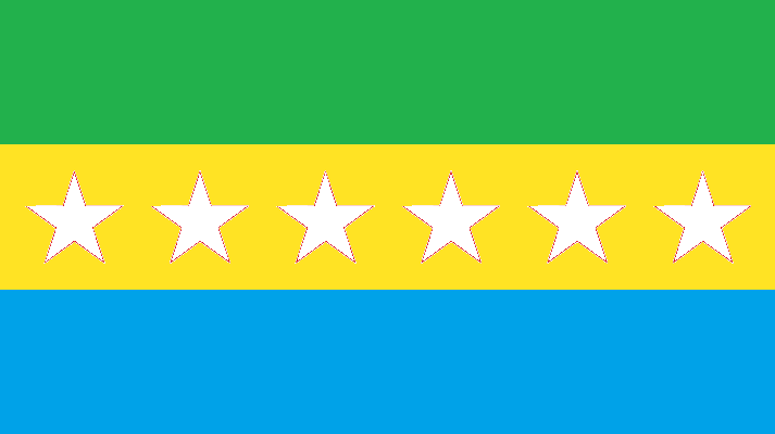 Bandera de Catamayo